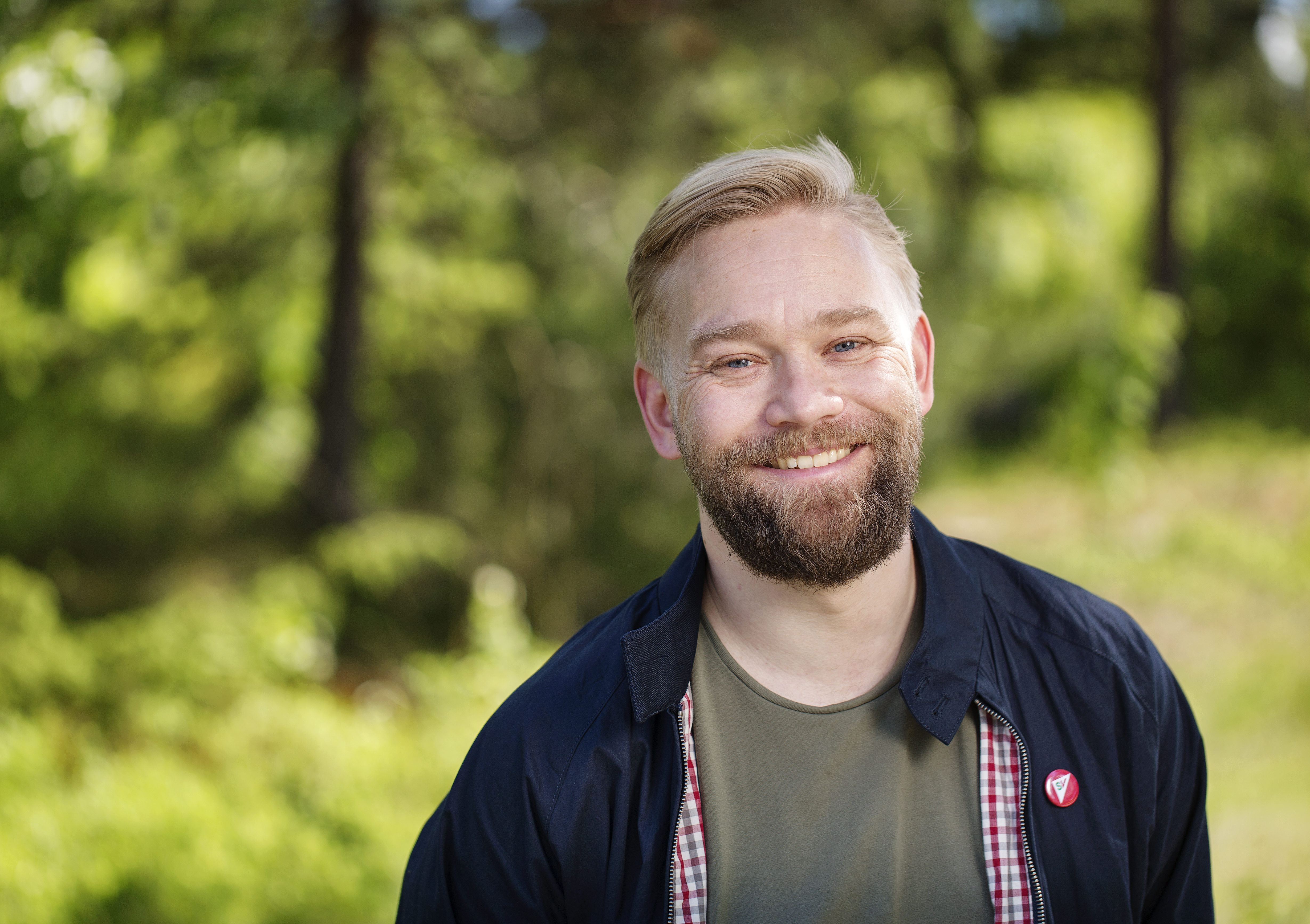 Audun Herning